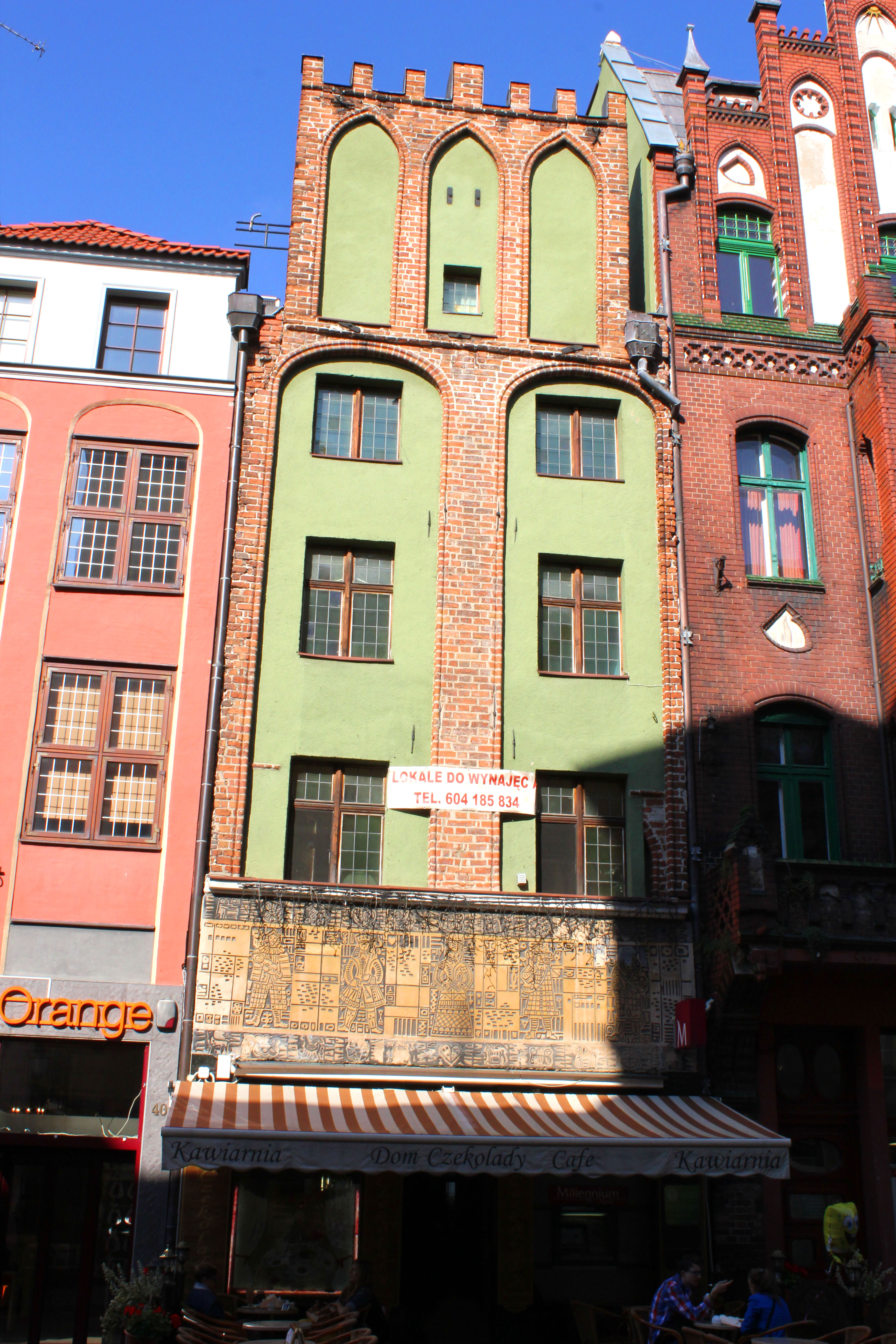 Toruń, ul. Szeroka 38 (dawniej 64) - kamienica, XIV/XV, XVI/XVII, XVIII, XX w. (zabytek nr A/430/256)